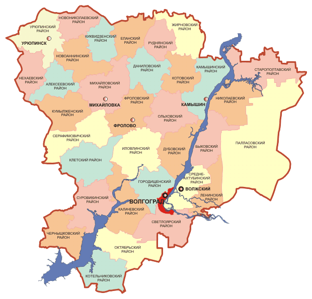 Административное деление Волгоградской области